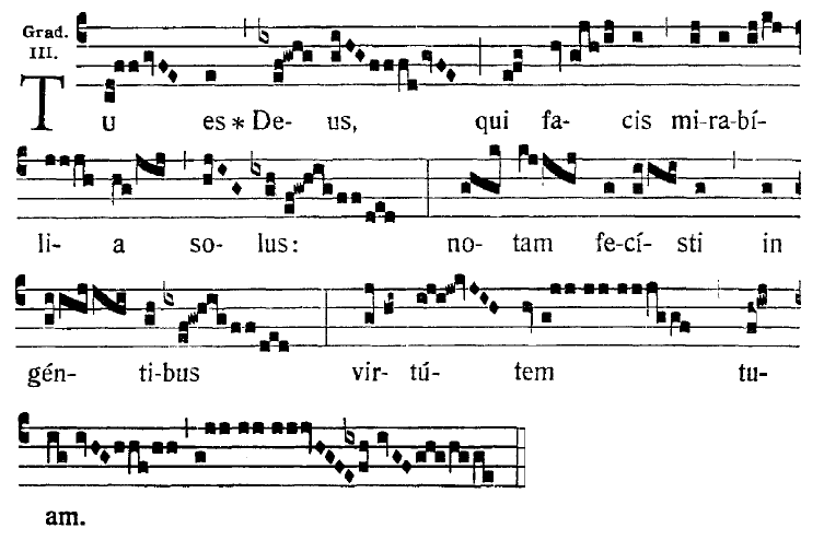 Beginn des Graduale Tu es Deus in Quadratnotation